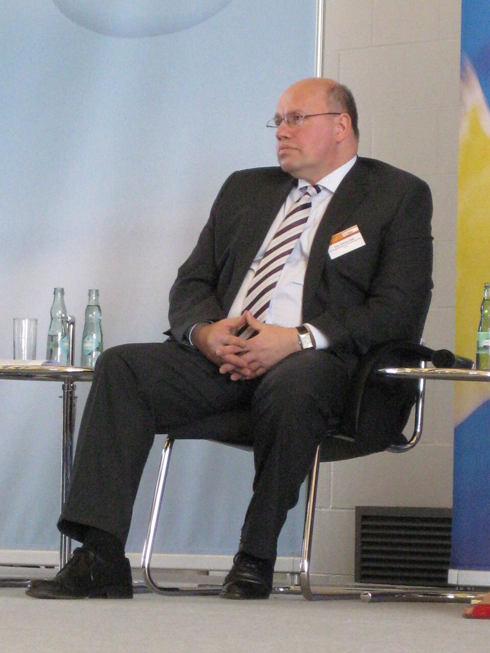 Peter Altmaier am 4.3.2009 auf dem CDU-Zukunftskongress Hannover